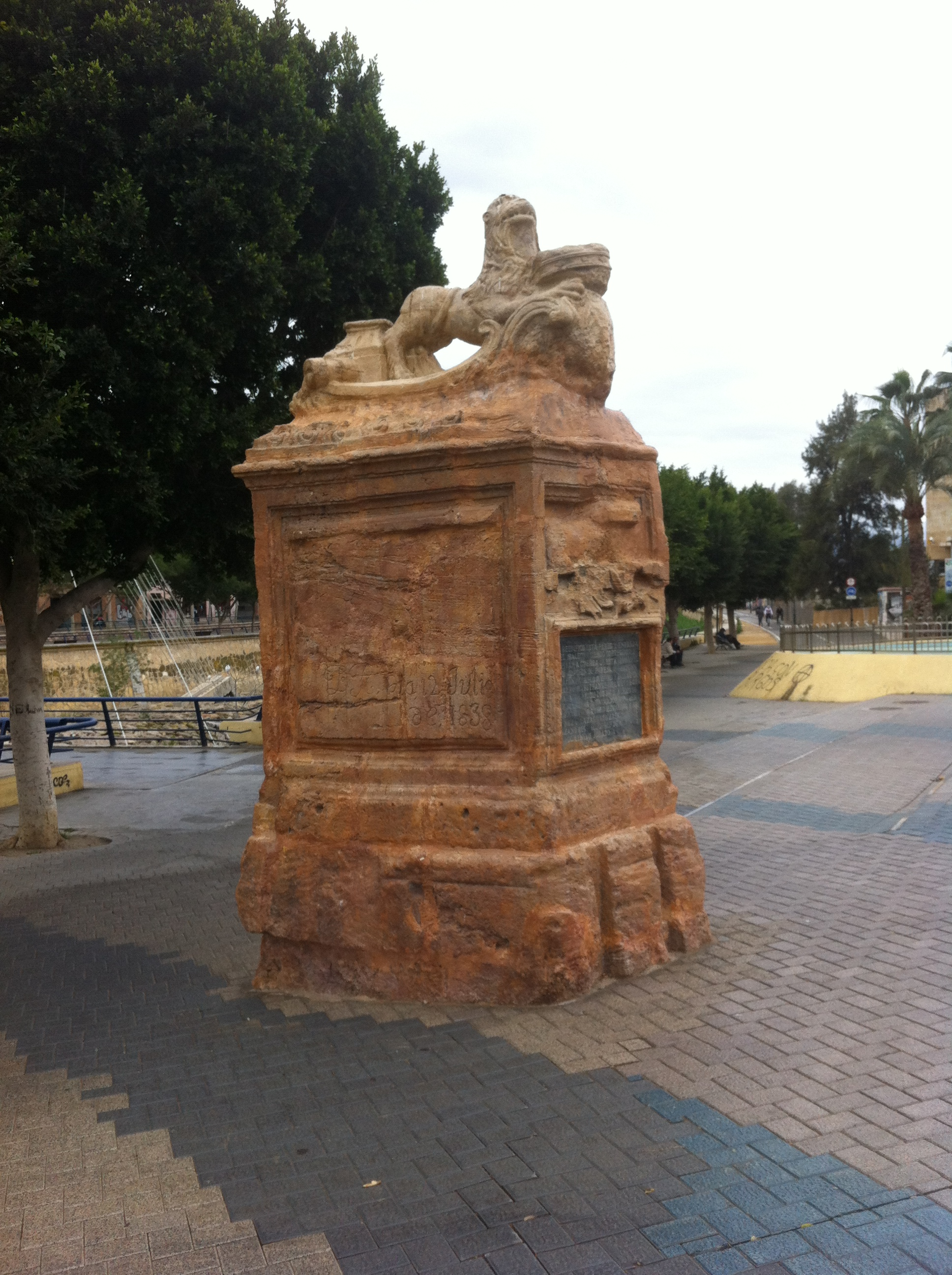 Réplica del León del Malecón de Murcia (siglo XVIII), situada entre la Pasarela del Malecón y el Paseo del mismo nombre, en las proximidades del río Segura (Murcia, España).